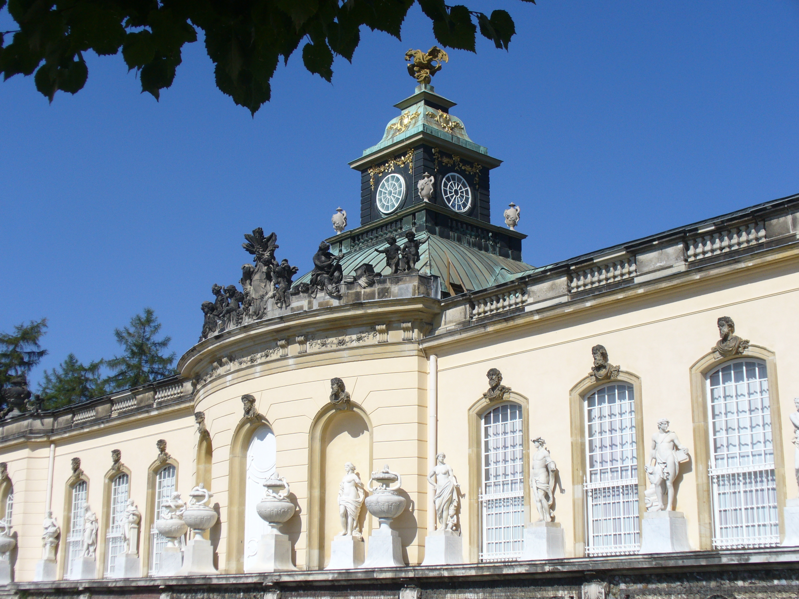 Skulpturen-Darstellungen Allegorien der Künste-Fassade-Bildergalerie Potsdam (1755-1764)